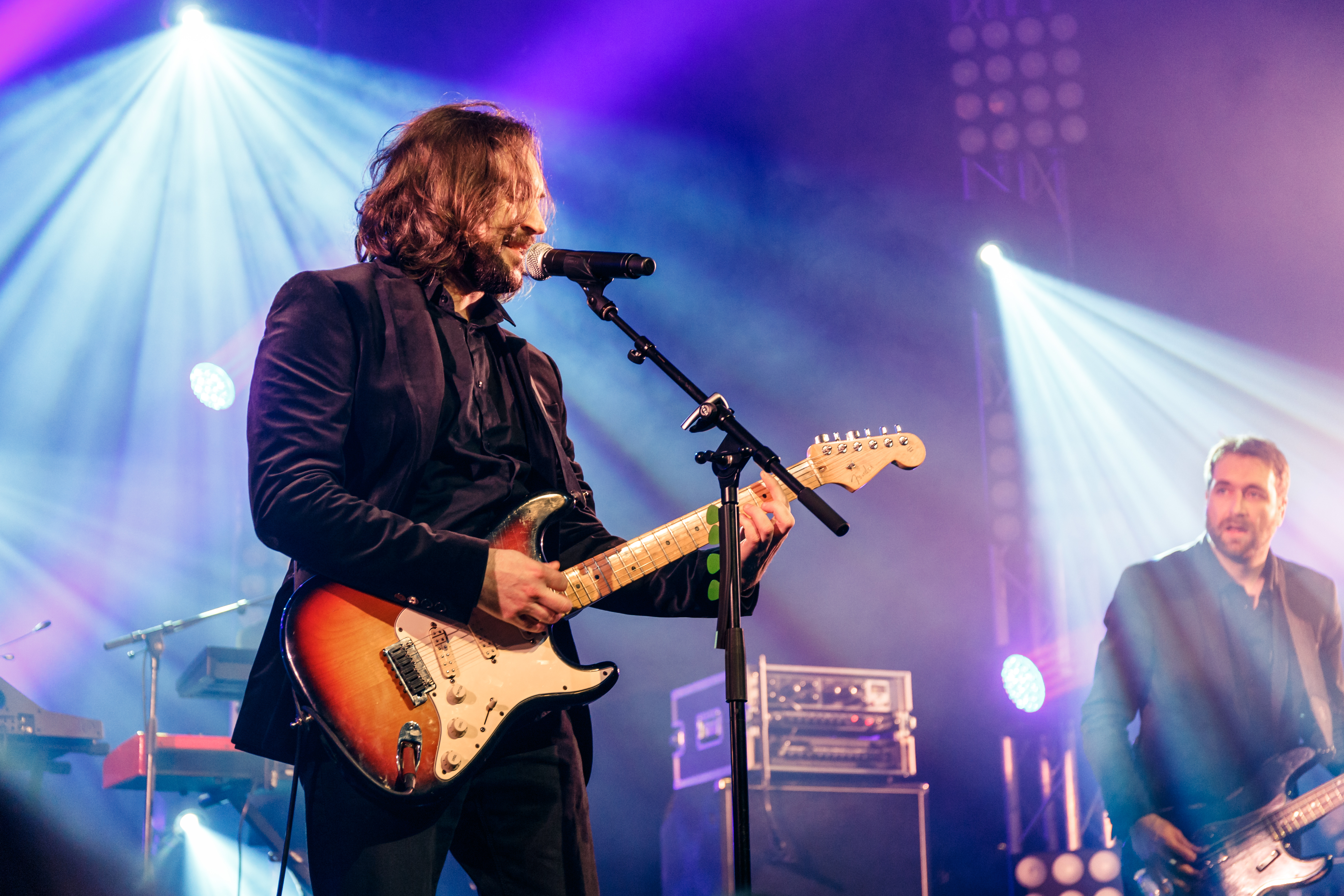 Premier concert du groupe Matmatah suite à sa reformation en 2016 à l'occasion de l'émission L'Avant-Scène tournée à l'Espace Avel Vor de Plougastel le 16 février 2017.